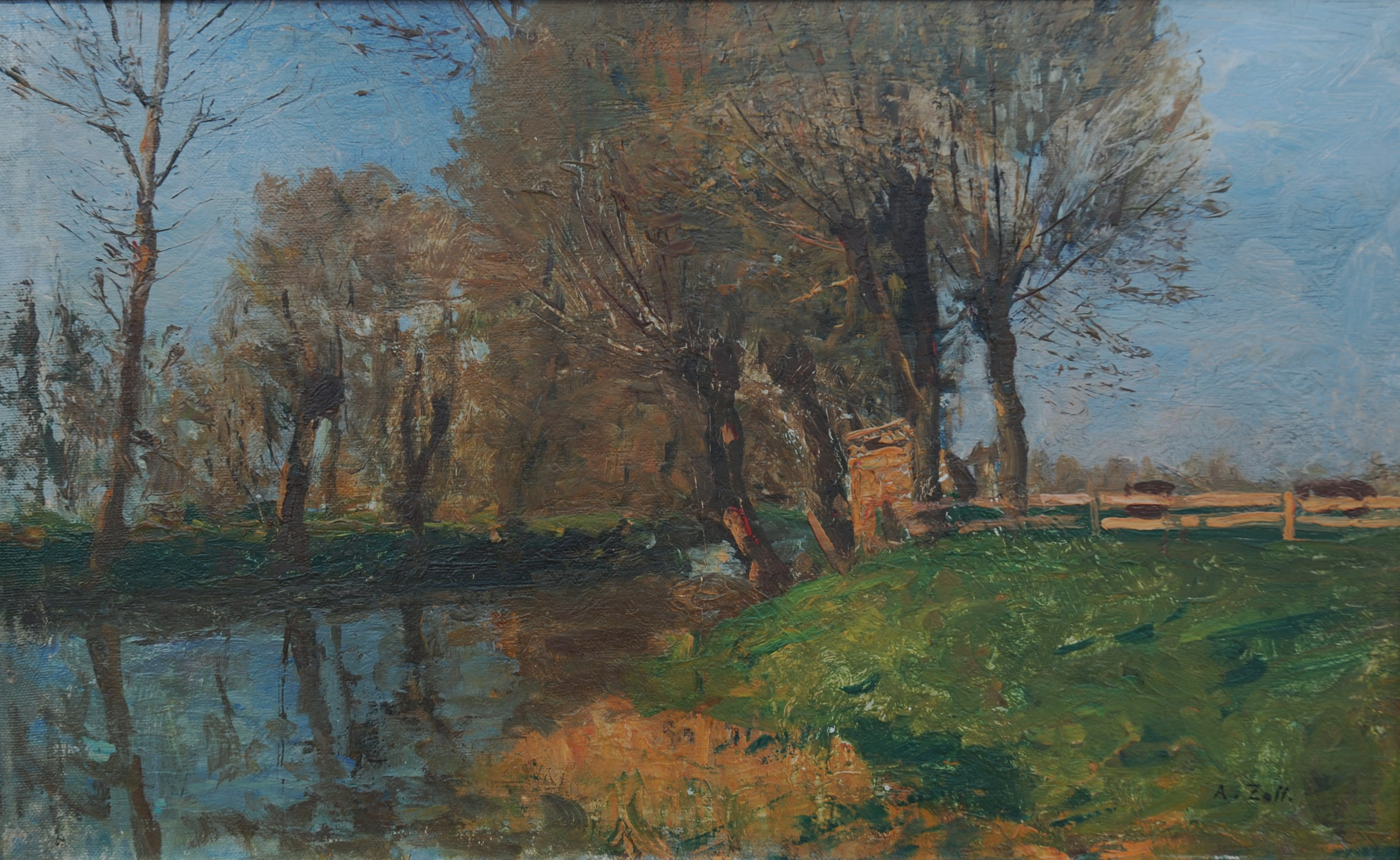 Am Weiher